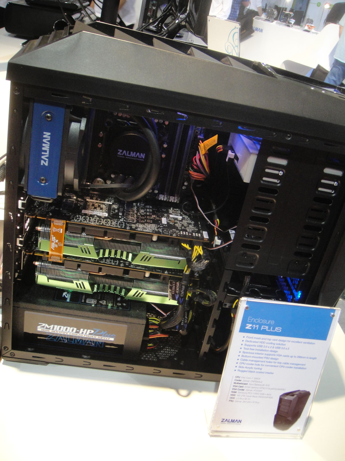 Zalman enclosure, CES 2012